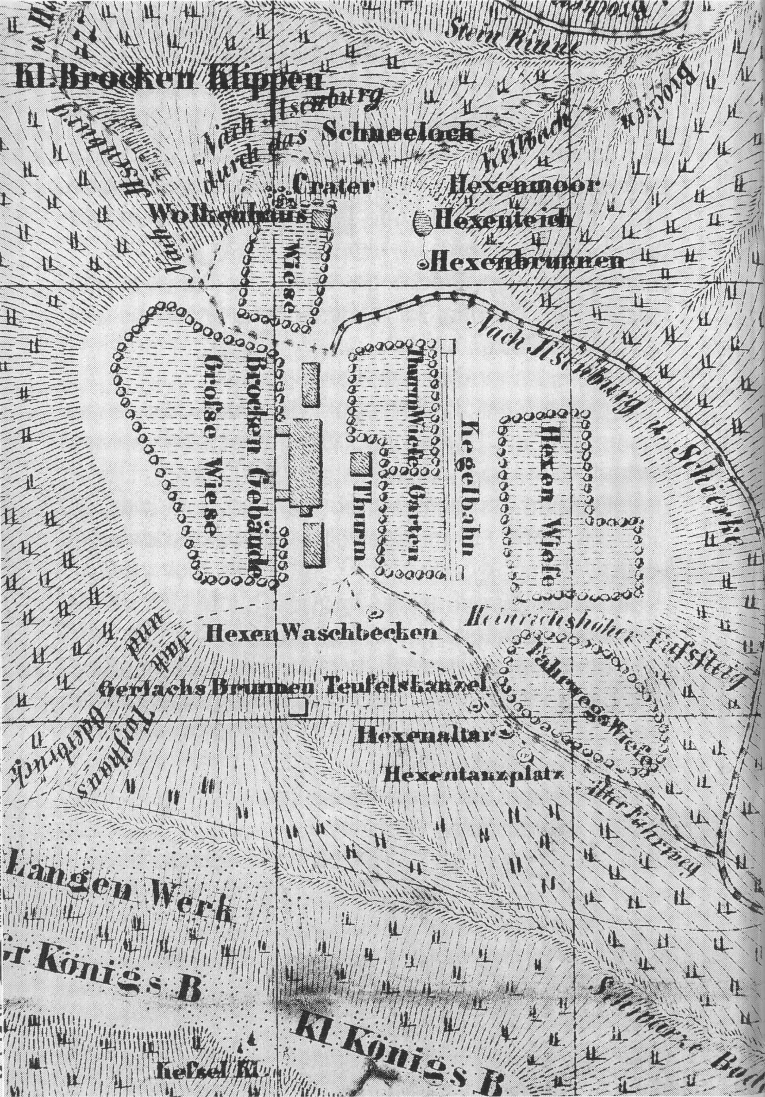 Ausschnitt der Brockenkarte von 1849 des Brockenwirtes Carl Eduard Nehse